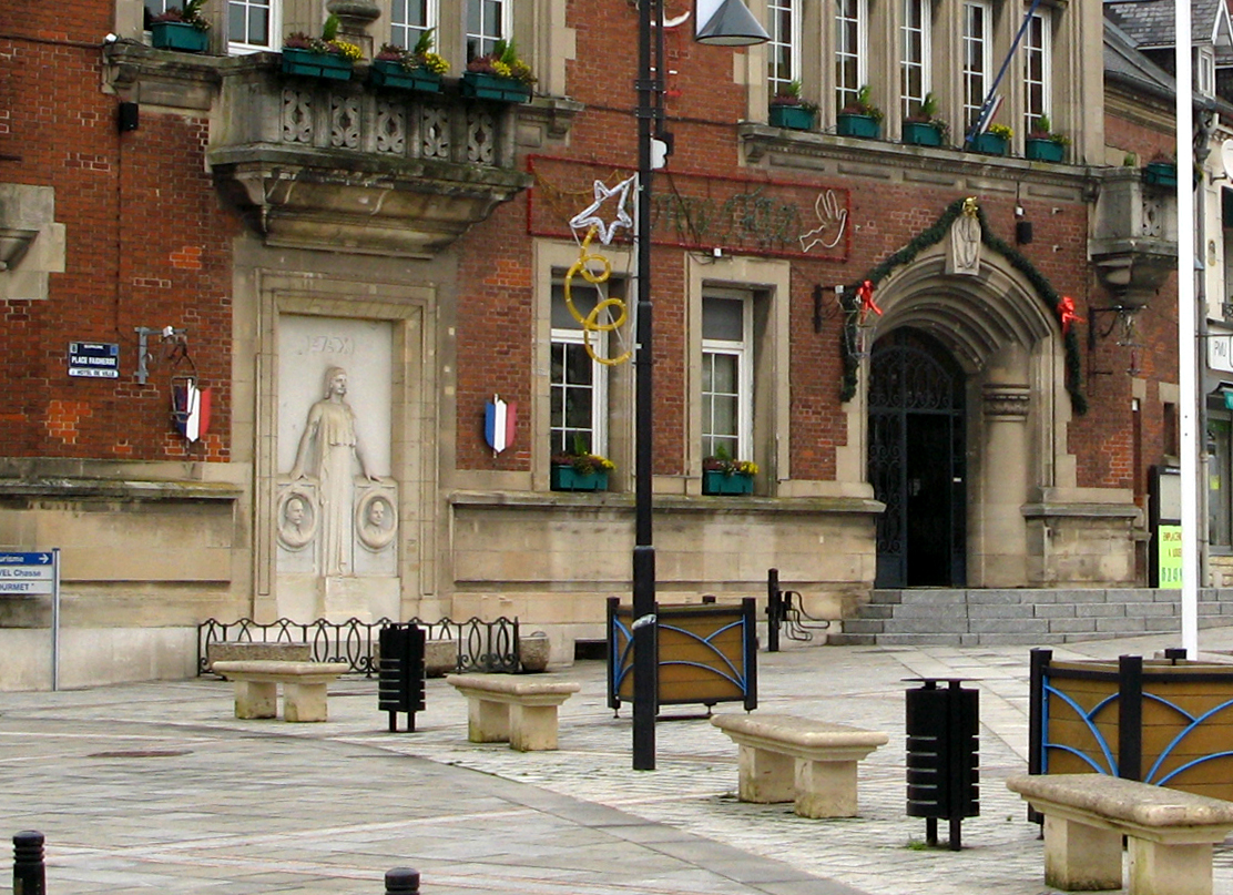 Bapaume (Pas-de-Calais, France) - Façade de l'hôtel-de-ville. .